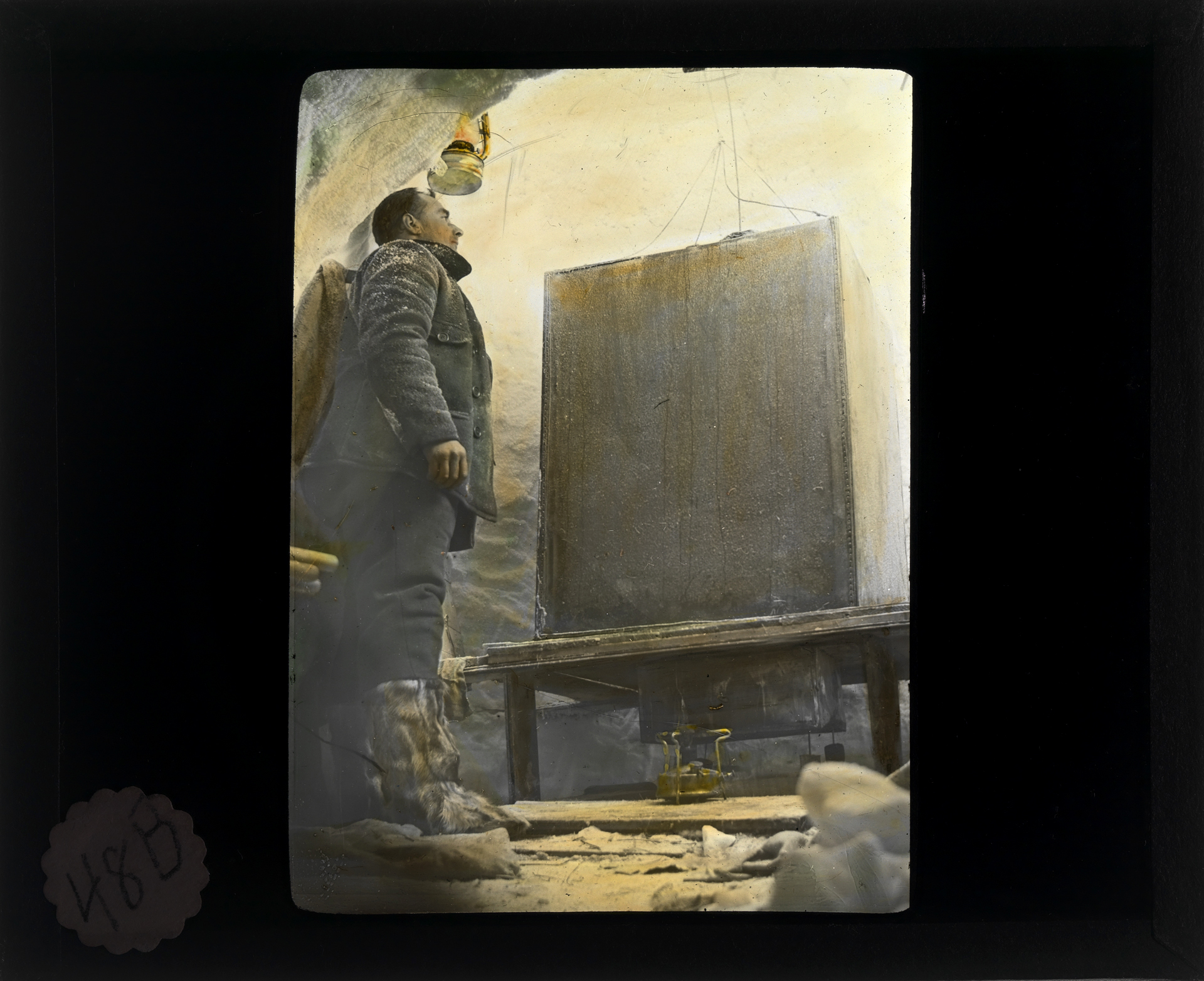 Tittel / Title: Sverre Hassel ved dampbadet i Framheim Motiv / Motif: Kolorert glasspositiv Dato / Date: 1911/1912 Fotograf / Photographer: ukjent / unknown Sted / Place: Antarktis, Hvalbukta, Framheim Eier / Owner Institution: Nasjonalbiblioteket / National Library of Norway Lenke / Link: Bildesignatur / Image Number: bldsa_NPRA685